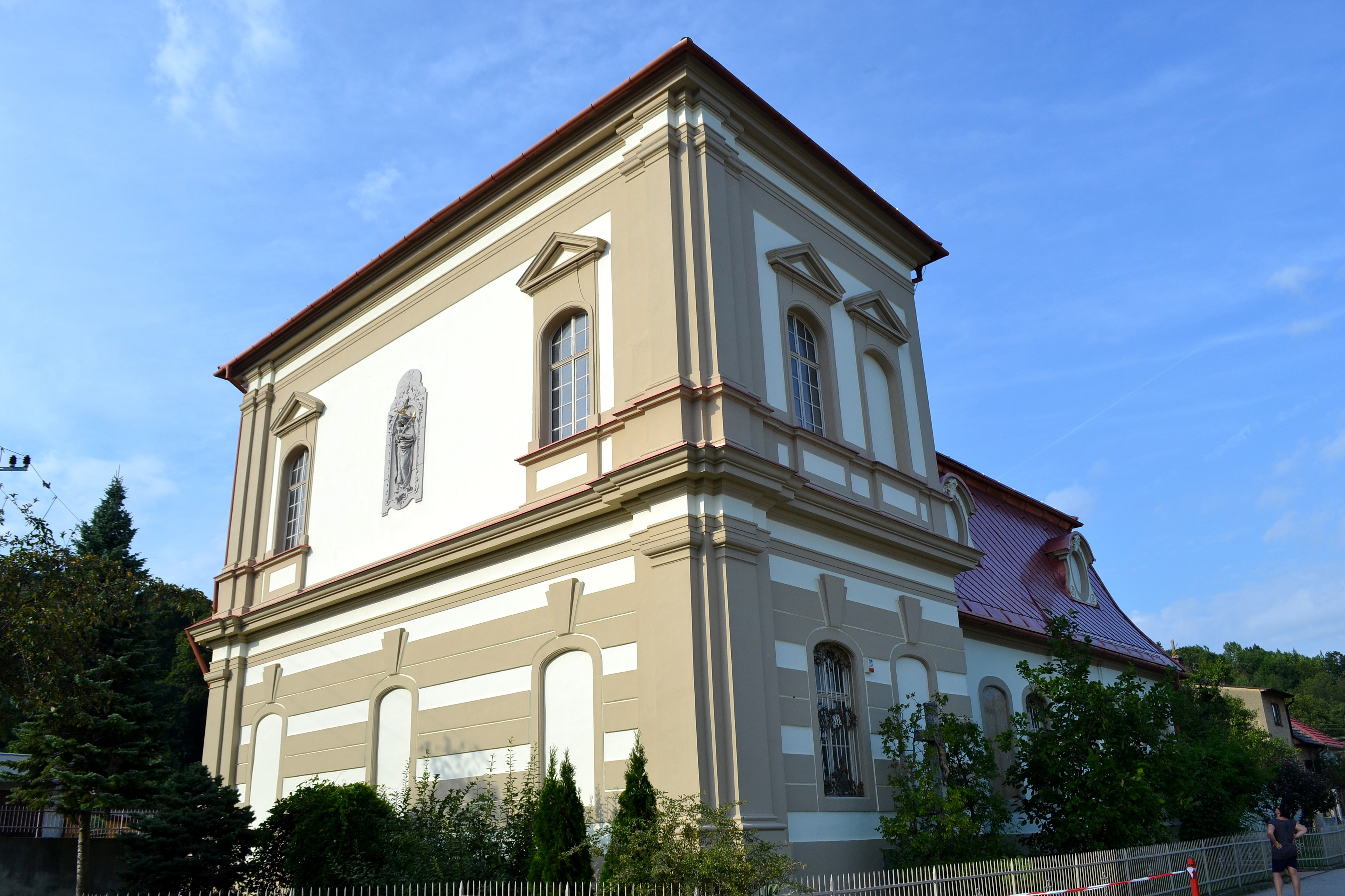 Trenčianske Bohuslavice, rokoková Kaplnka Nepoškvrneného počatia Panny Márie; celkový pohľad